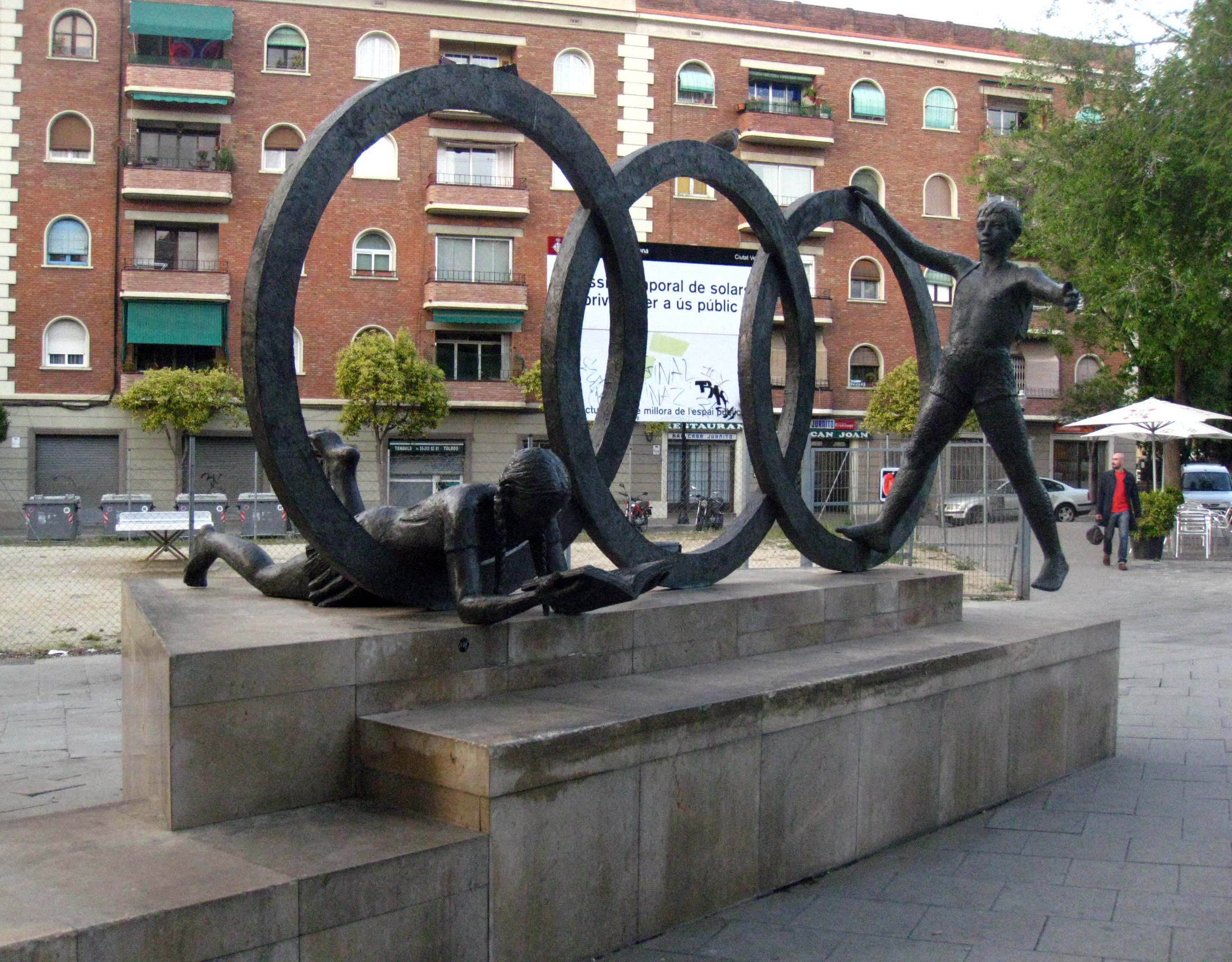 Homenatge a la Mútua Escolar Blanquerna 1924-1939 (Núria Tortras). Pl. Blanquerna (Barcelona)